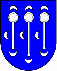 Escudo del linaje Padilla